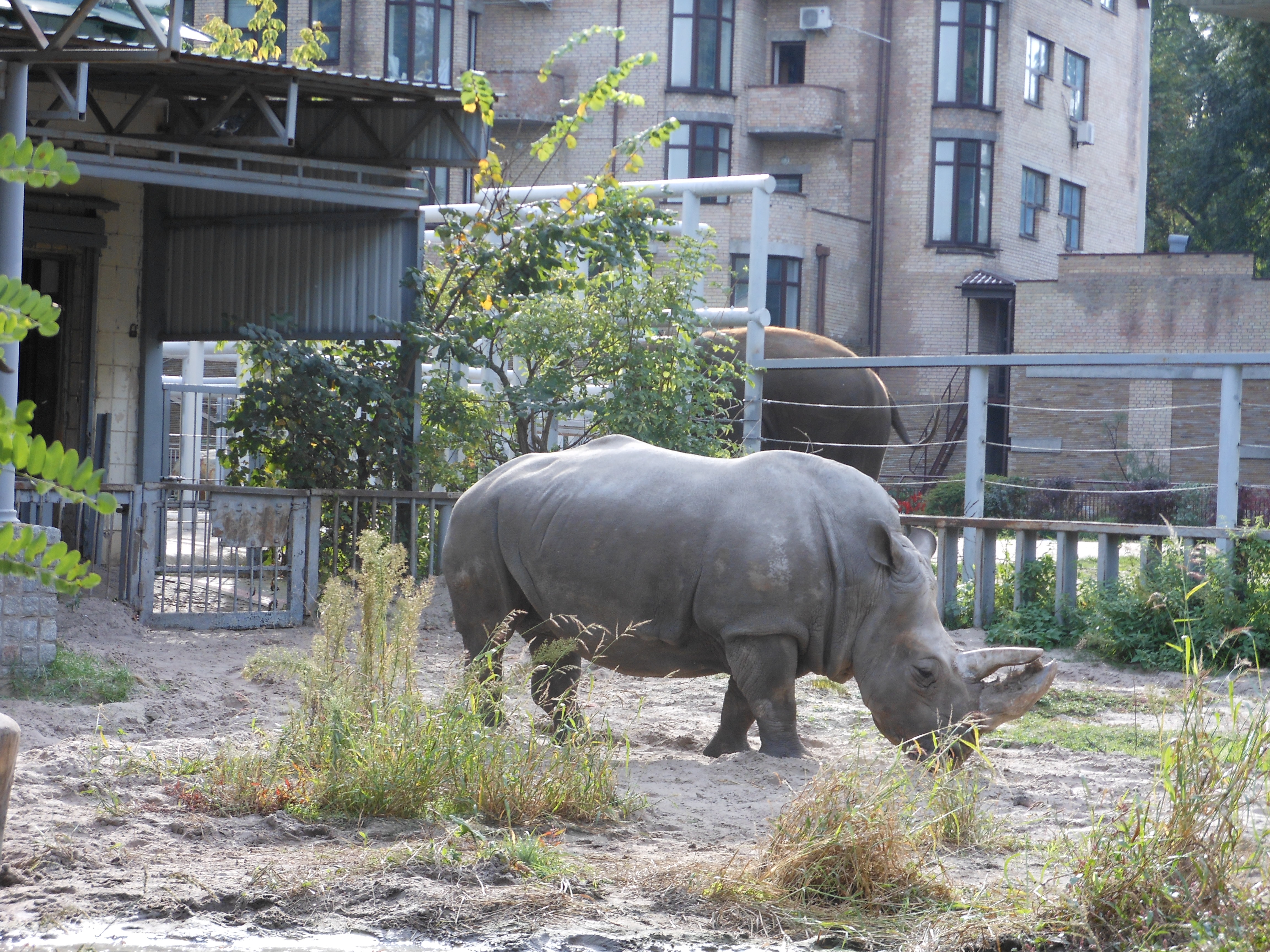 Київський зоопарк, Шевченківський район